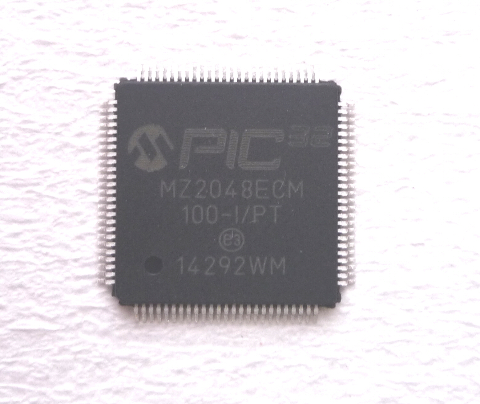 Pic32mz2048ecm100-ipt